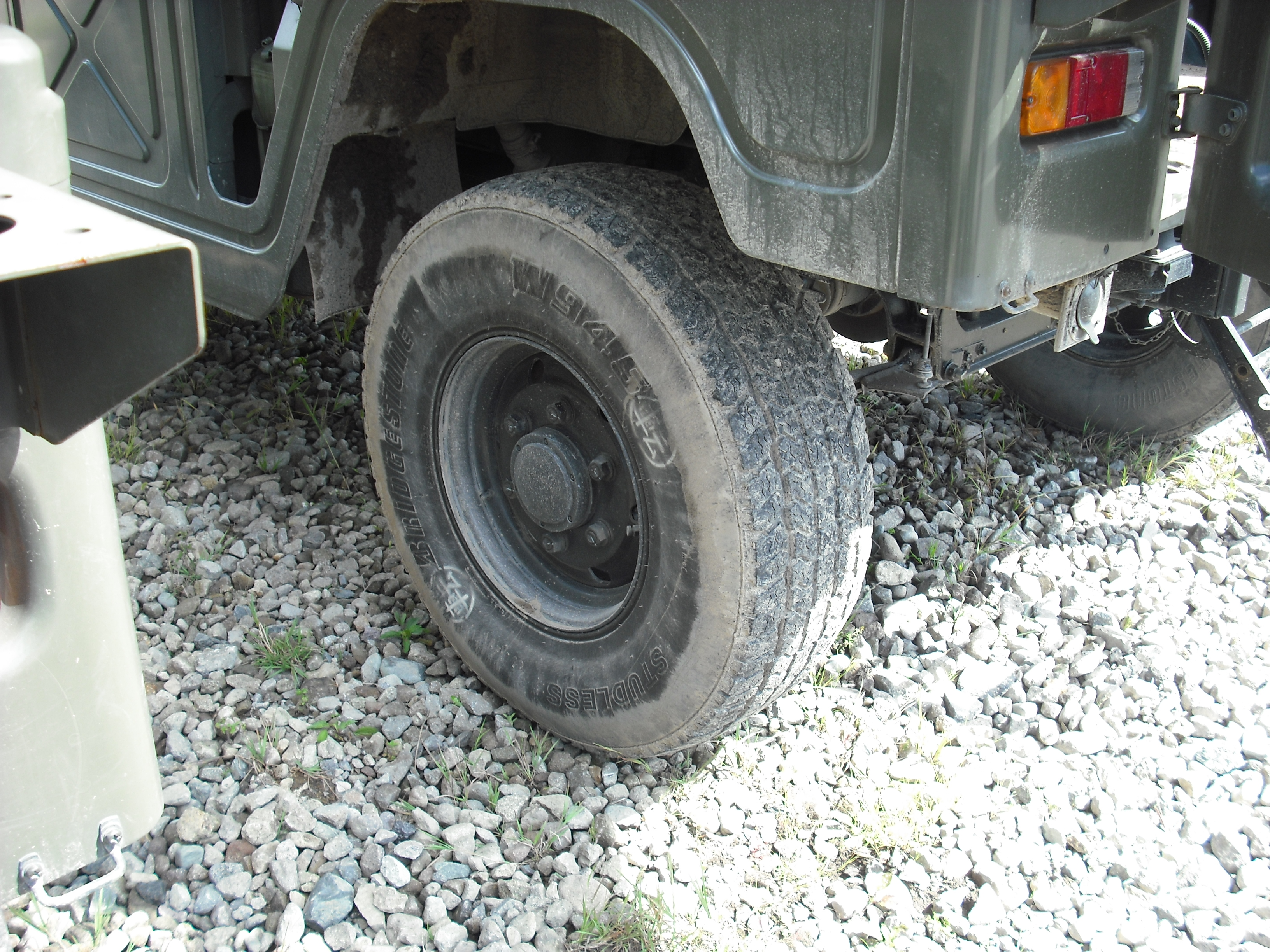 高機動車で使用されていたブリザックW945を撮影、サイプの形状が鍵穴に近いように見える